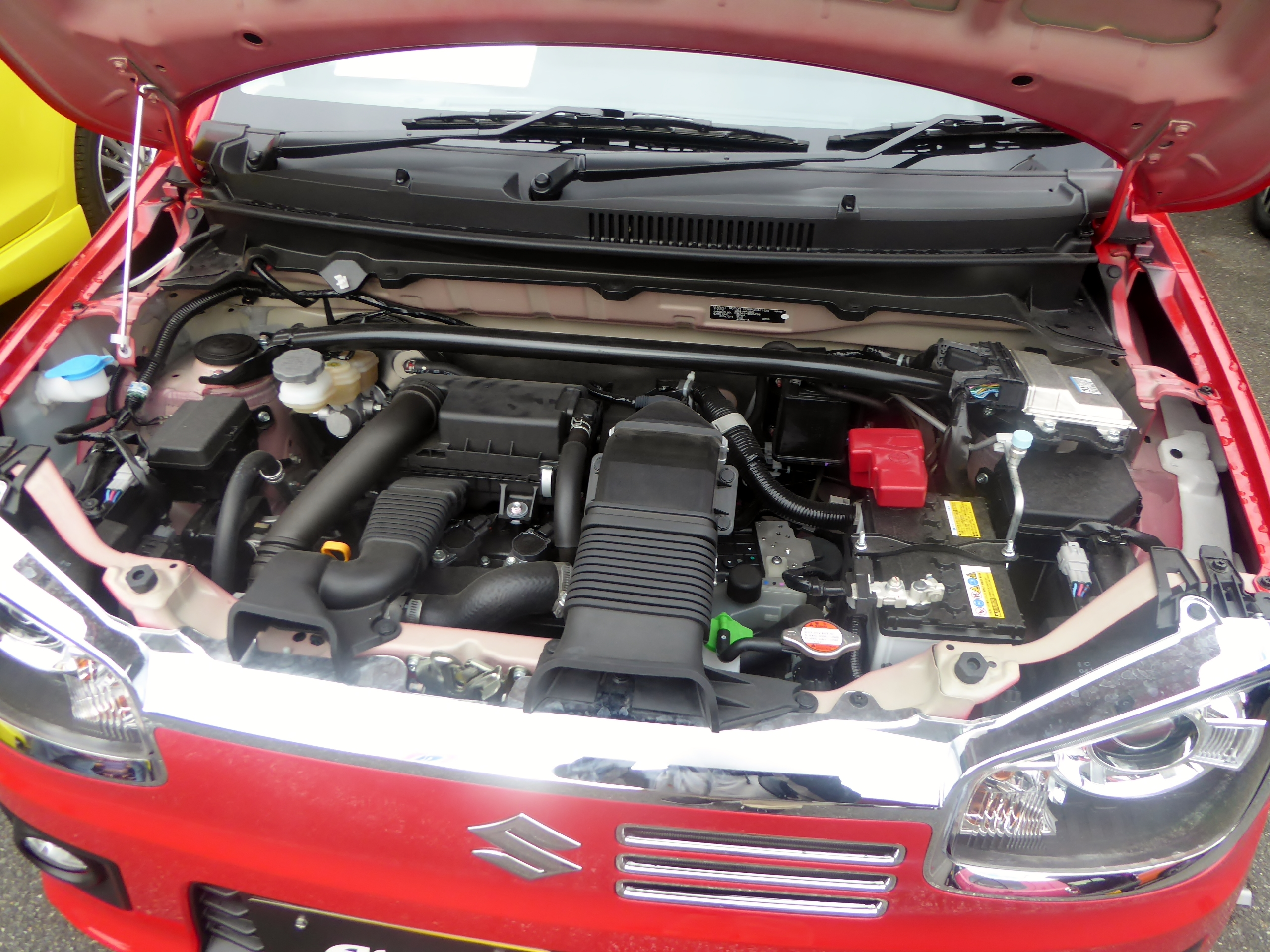 DBA-HA36S型スズキ・アルトターボRSのエンジンルームを撮影。